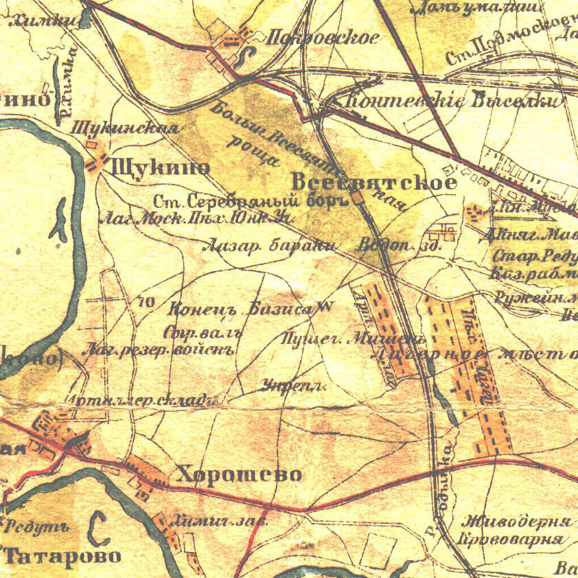 Фрагмент карты Окрестностей Москвы начала XX века